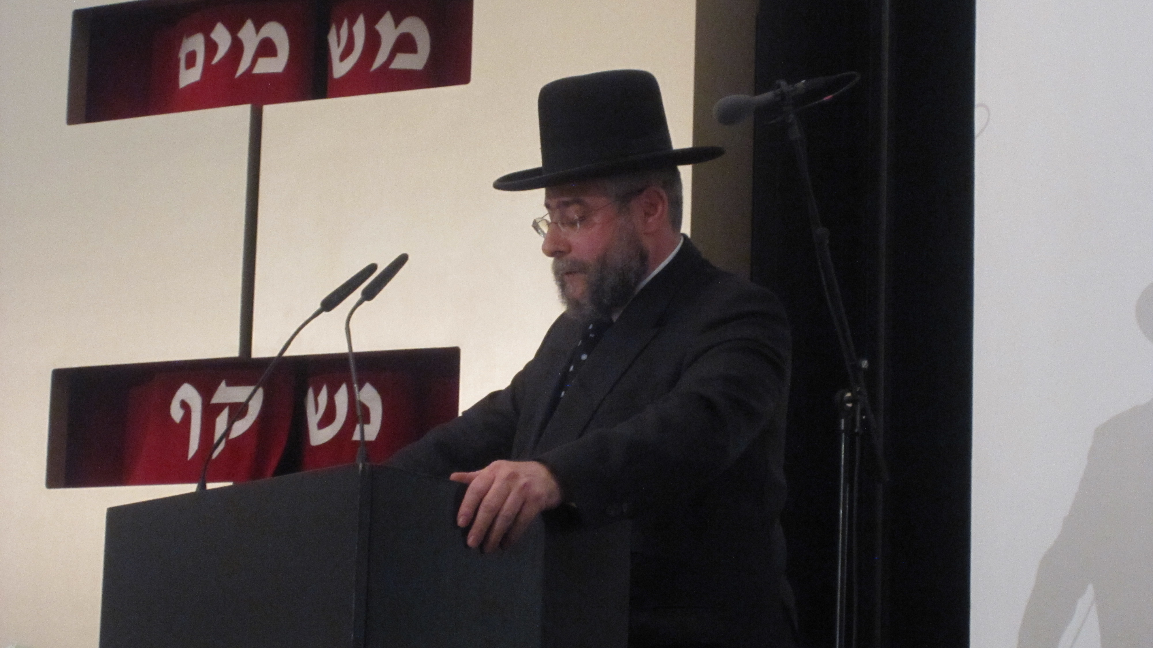 9 Pinchas Goldschmidt, Vorsitzender der Europäischen Rabbinerkonferenz bei der Einweihung der Speyerer Synagoge